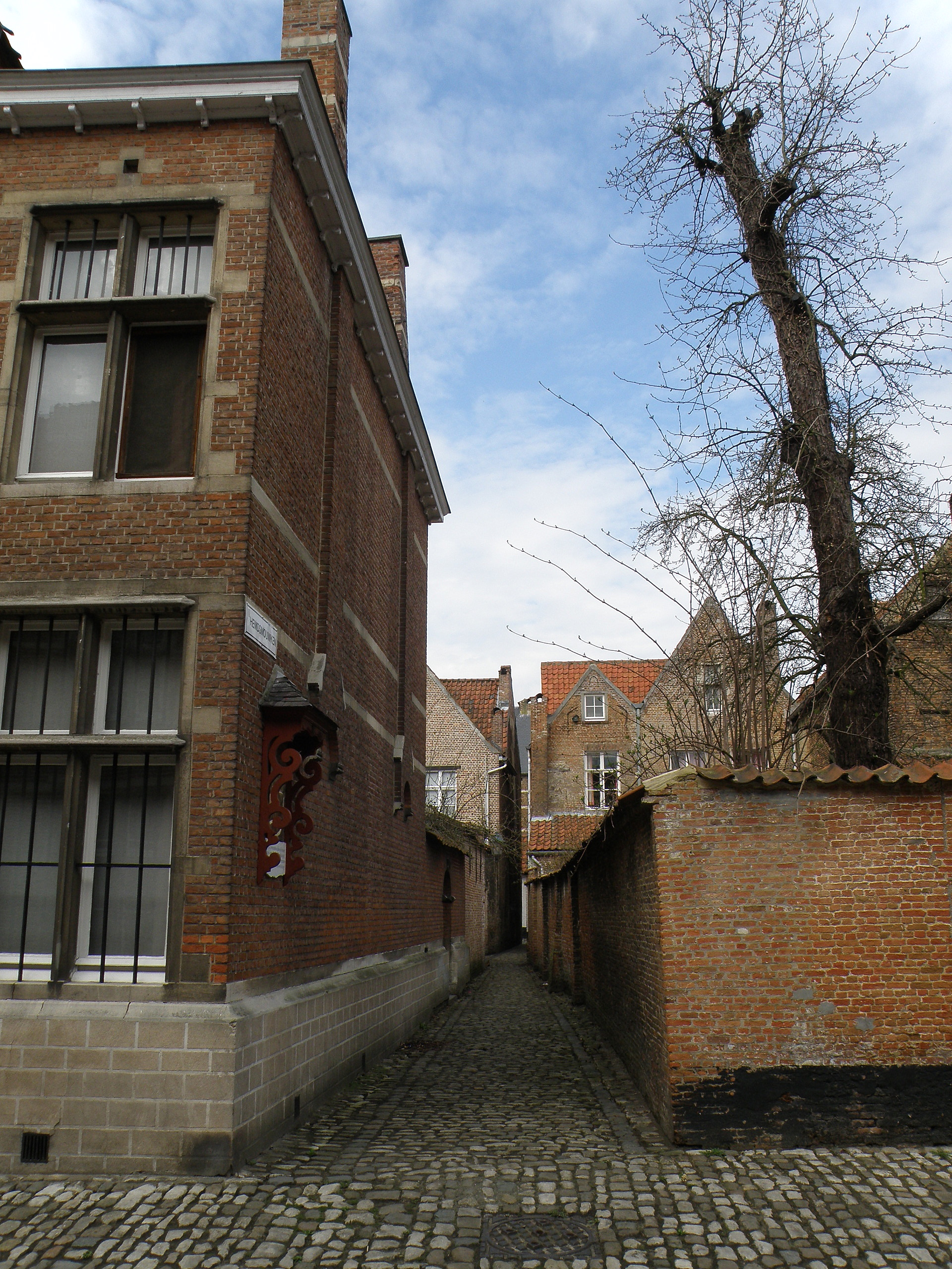 Lierre (en néerl. Lier), ville de Flandre (Belgique), située à une quinzaine de km. au sud-est d’Anvers. Béguinage, ruelle dénommée Hemdsmouwken (litt. manche de chemise) débouchant dans la rue Grachtkant. Au premier plan à gauche, visible partiellement : maison dite Sint-Adrianus, sise Grachtkant n° 16, de 1907. La maison au fond à droite, à double pignon, sise Sint-Margaretastraat n° 11, dite De Onbevlekte Ontvangenis (l'Immaculée Conception), faisait autrefois, au XIXe siècle, office d'école primaire, que fréquenta l'écrivain et avocat Tony Bergmann.